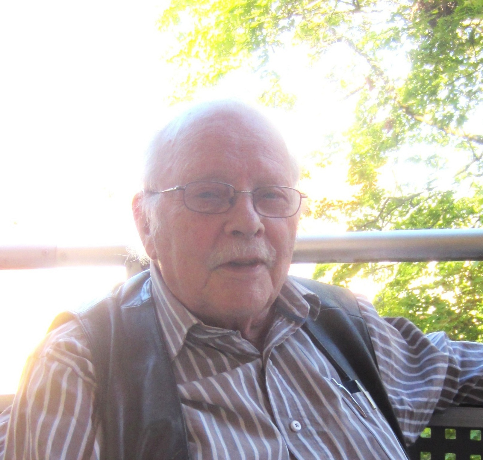 Rolf Carlsten (1926-2015), son till Dora och Rune Carlsten samt barnbarn till Märta och Hjalmar Söderberg.